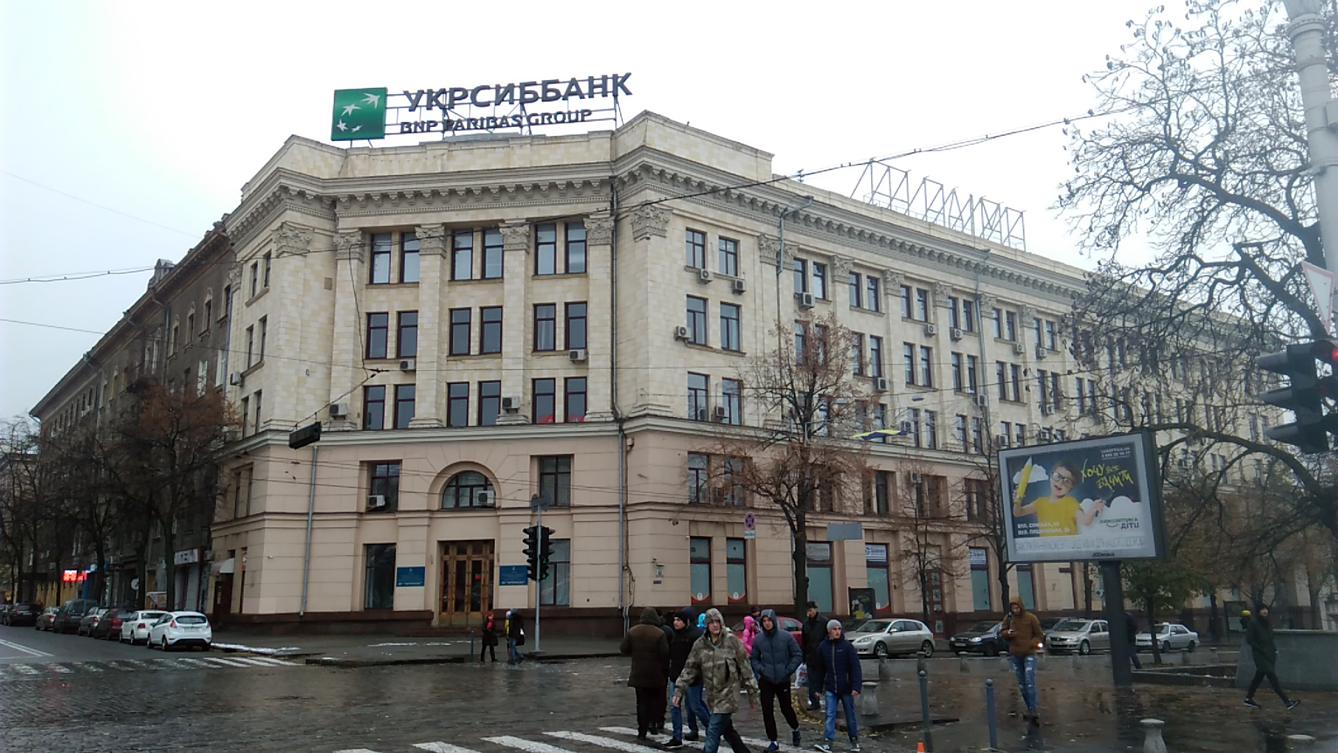 Будівля Державного інституту проектування підприємств коксохімічної промисловості «Діпрококс» на вул. Сумській, 60 у Харкові